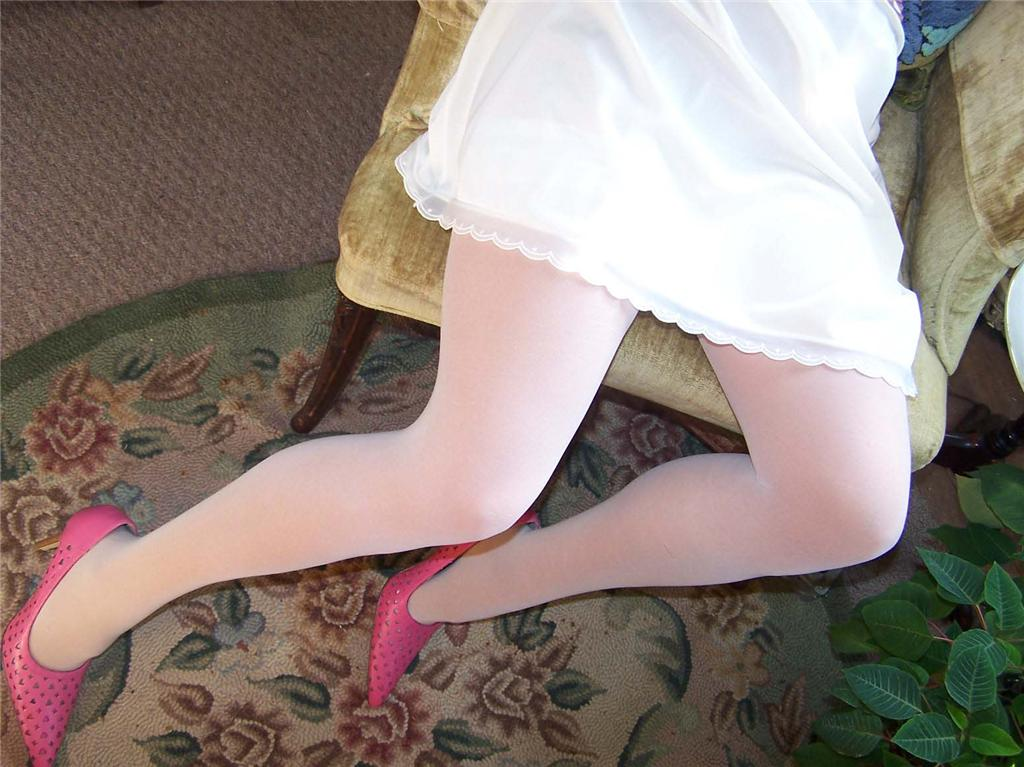 White silk stockings